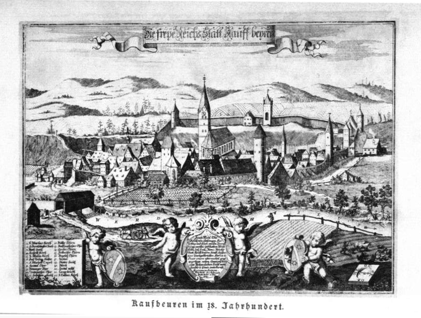 Kaufbeuren